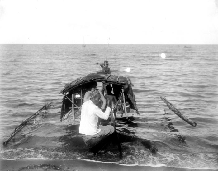 Repronegatief. Halmahera, Alfurs gezin woont in een prauw aan het strand te Weda